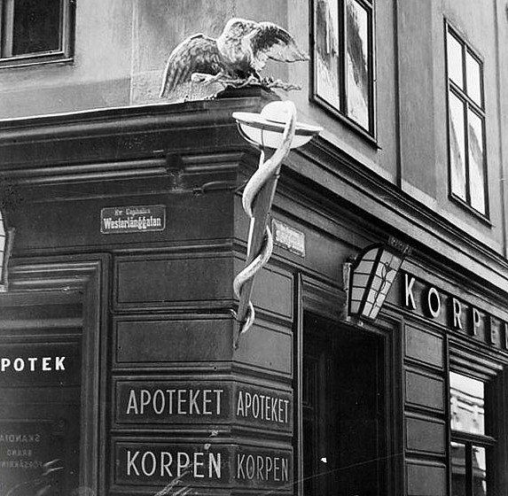 Apoteket Korpen låg mellan 1924 och 1948 vid Västerlånggatan 6